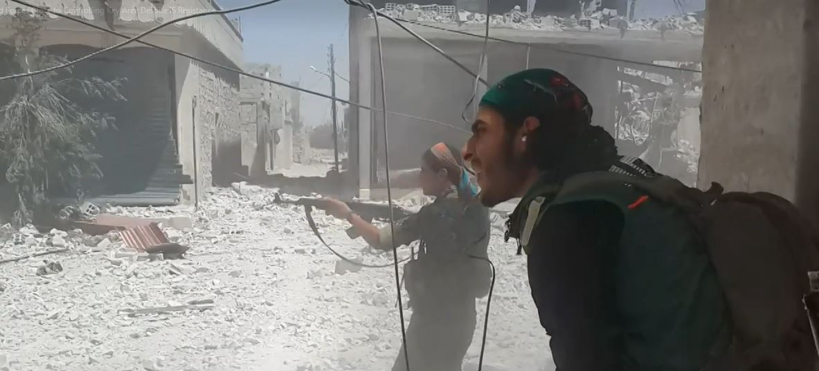 Membres des FDS à Manbij, le 29 juillet 2016.